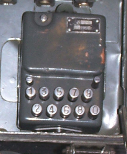 Perforator taśmy celuloidowej (telegramu szyfrowego) radiostacji R-350M. Zdjęcie pochodzi ze strony